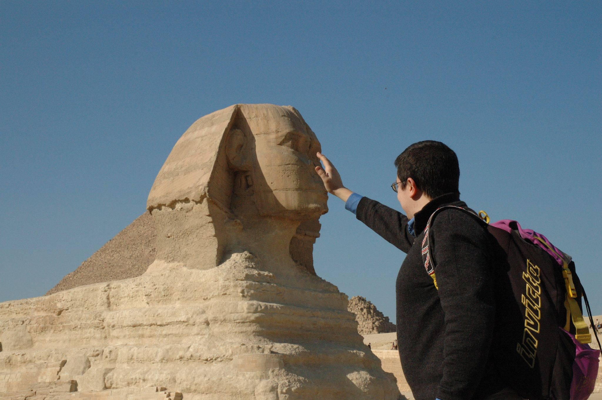 Giza: Carlo accarezza la sfinge